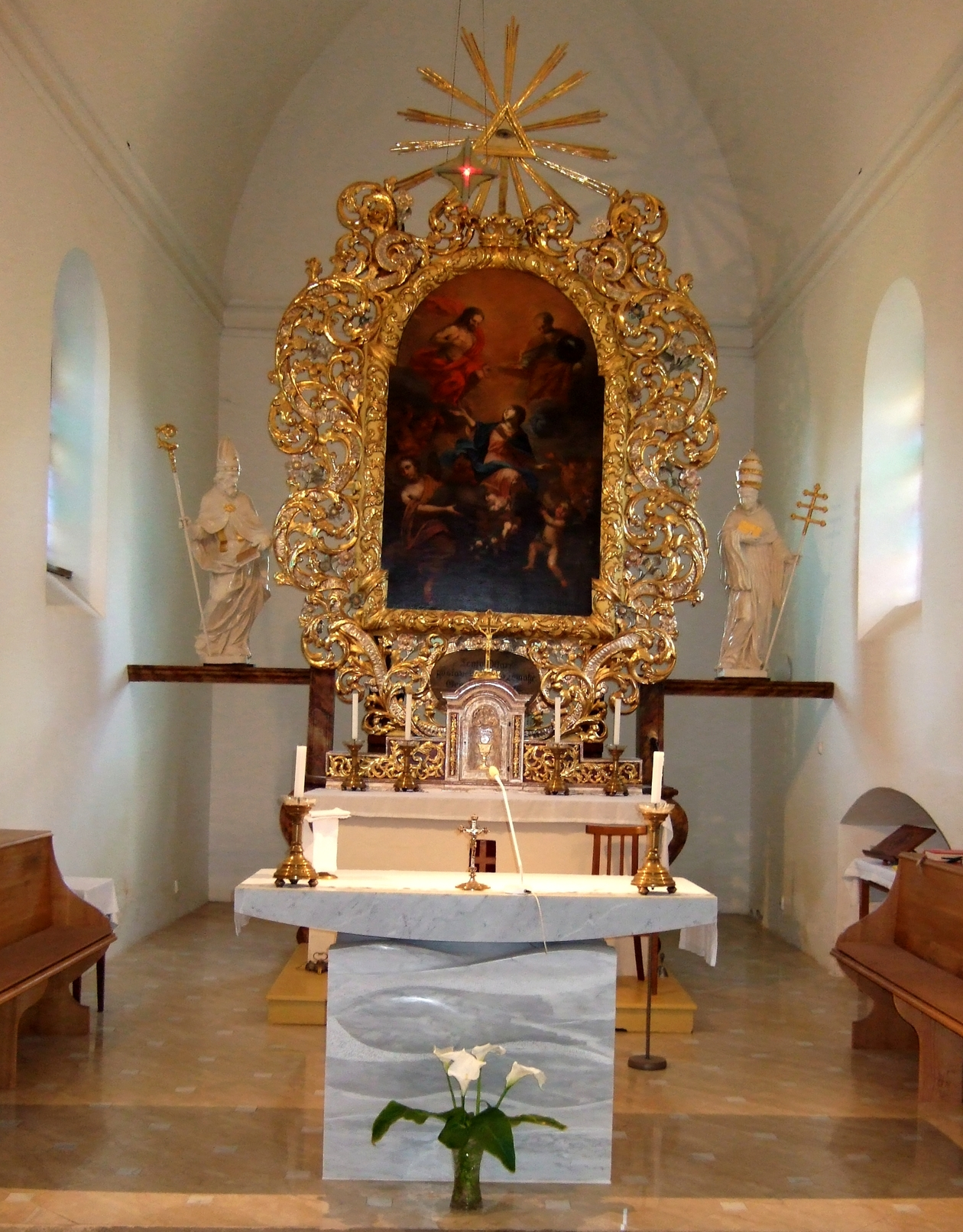 Kostel v Cernosicich - hlavni oltar